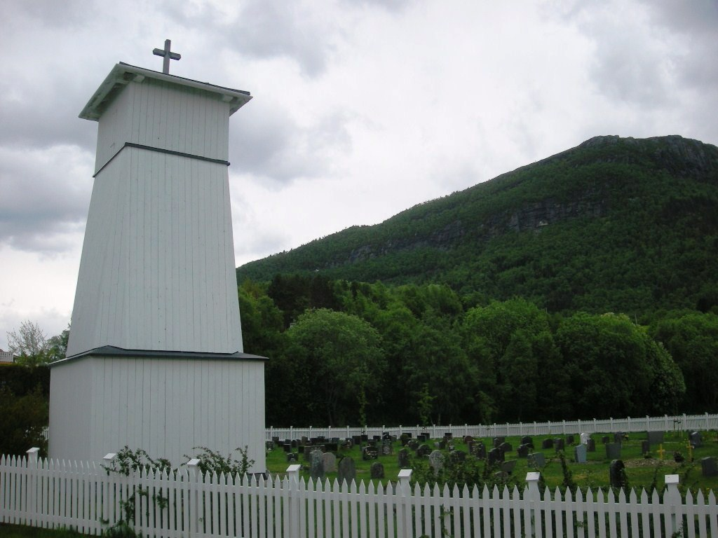 Ven kirkegård, Snillfjord kommune